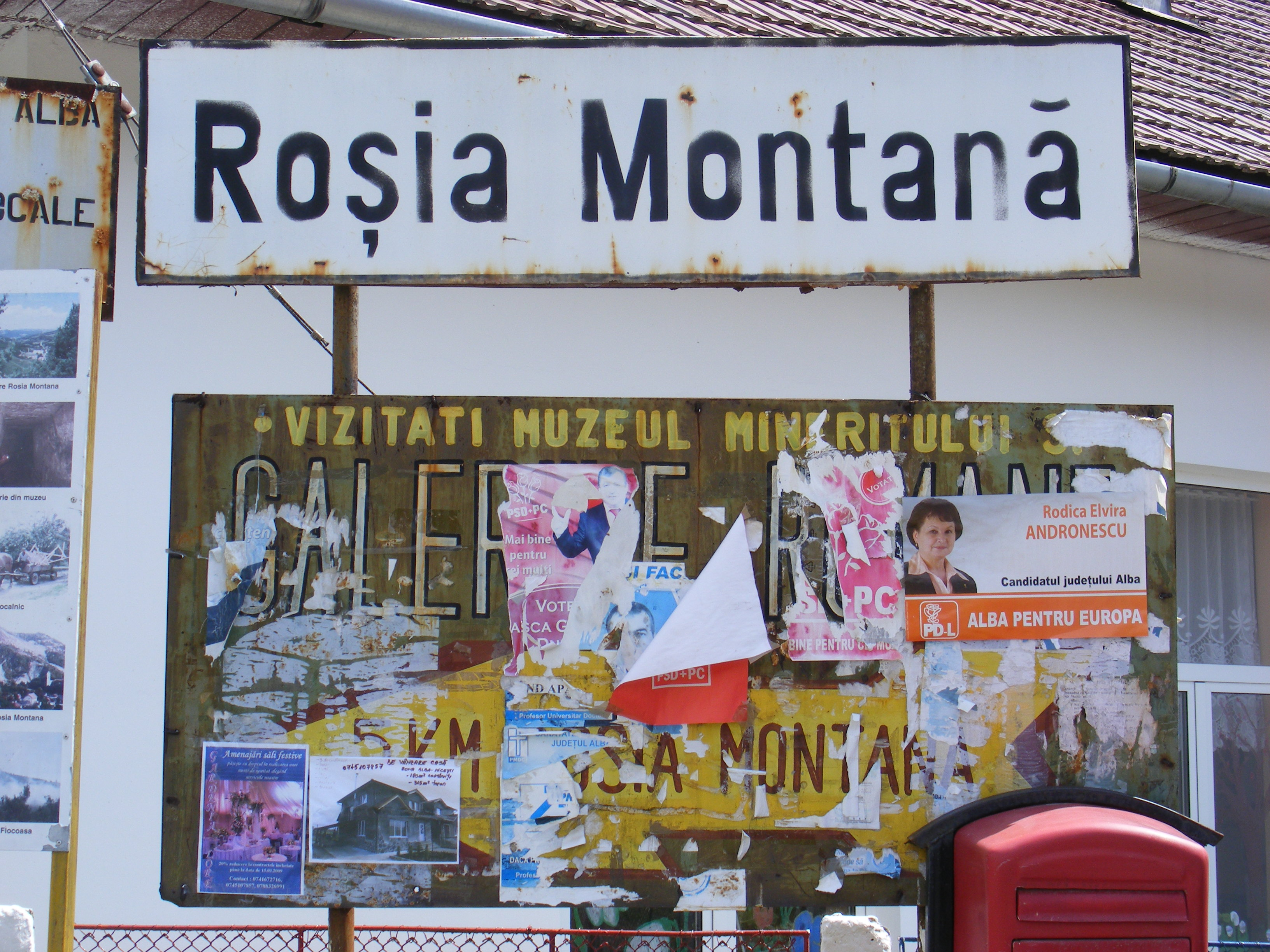 Panneau d'entrée de la commune de Roșia Montană, à Gura Roșiei.